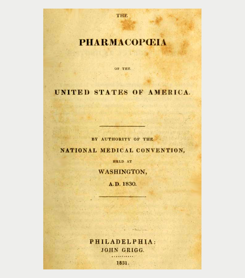 Titelblatt